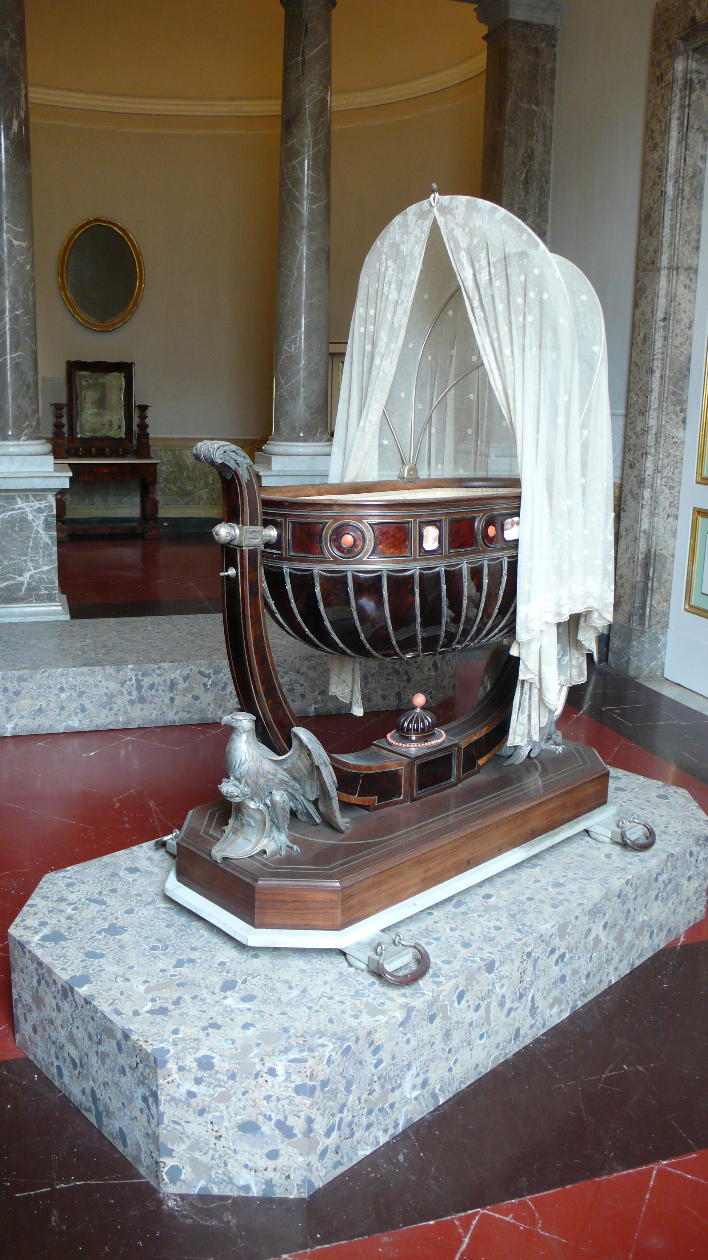 Culla donata nel 1937 dal Comune di Napoli alla casa Savoia, in occasione della nascita dell’erede al trono Vittorio Emanuele. Foto scattata nelle sale della Reggia di Caserta nel 2012.